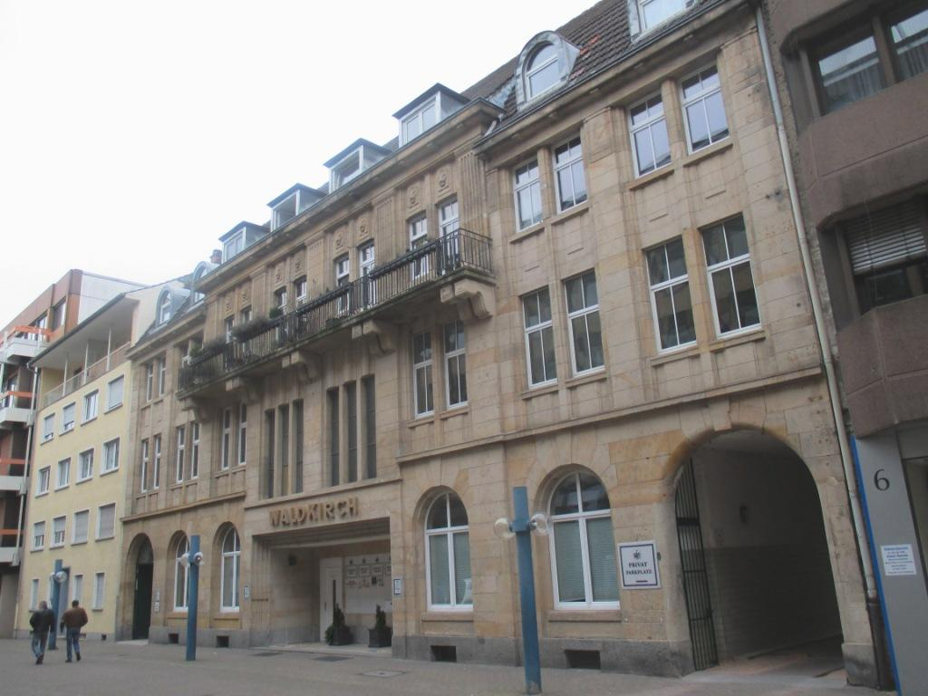 Ludwigshafen (Rhein), Ehemaliges Verlagsgebäude der Fa. Waldkirch